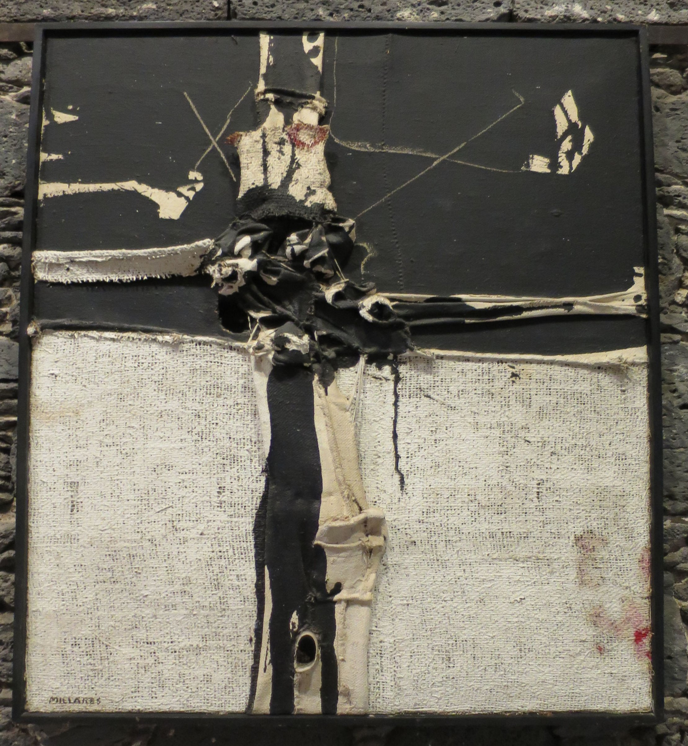 Manuel Millares - ';Cuadro 201';mixed media, 1962, Castillo de San José.JPG